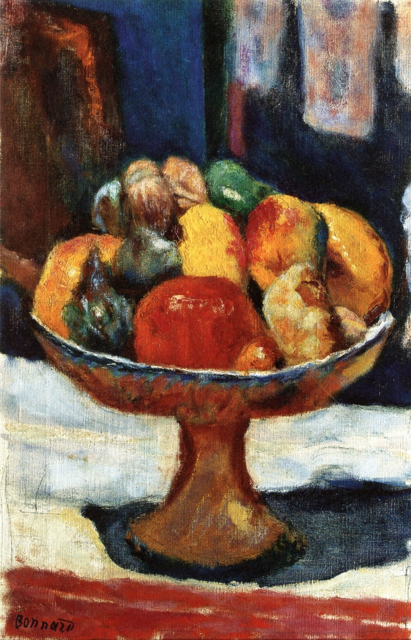 Картины Пьера Боннара (фр. Pierre Bonnard; 3 октября 1867 года, Париж, — 23 января 1947 года, Ле-Канне, деп. Приморские Альпы), французского живописца и графика